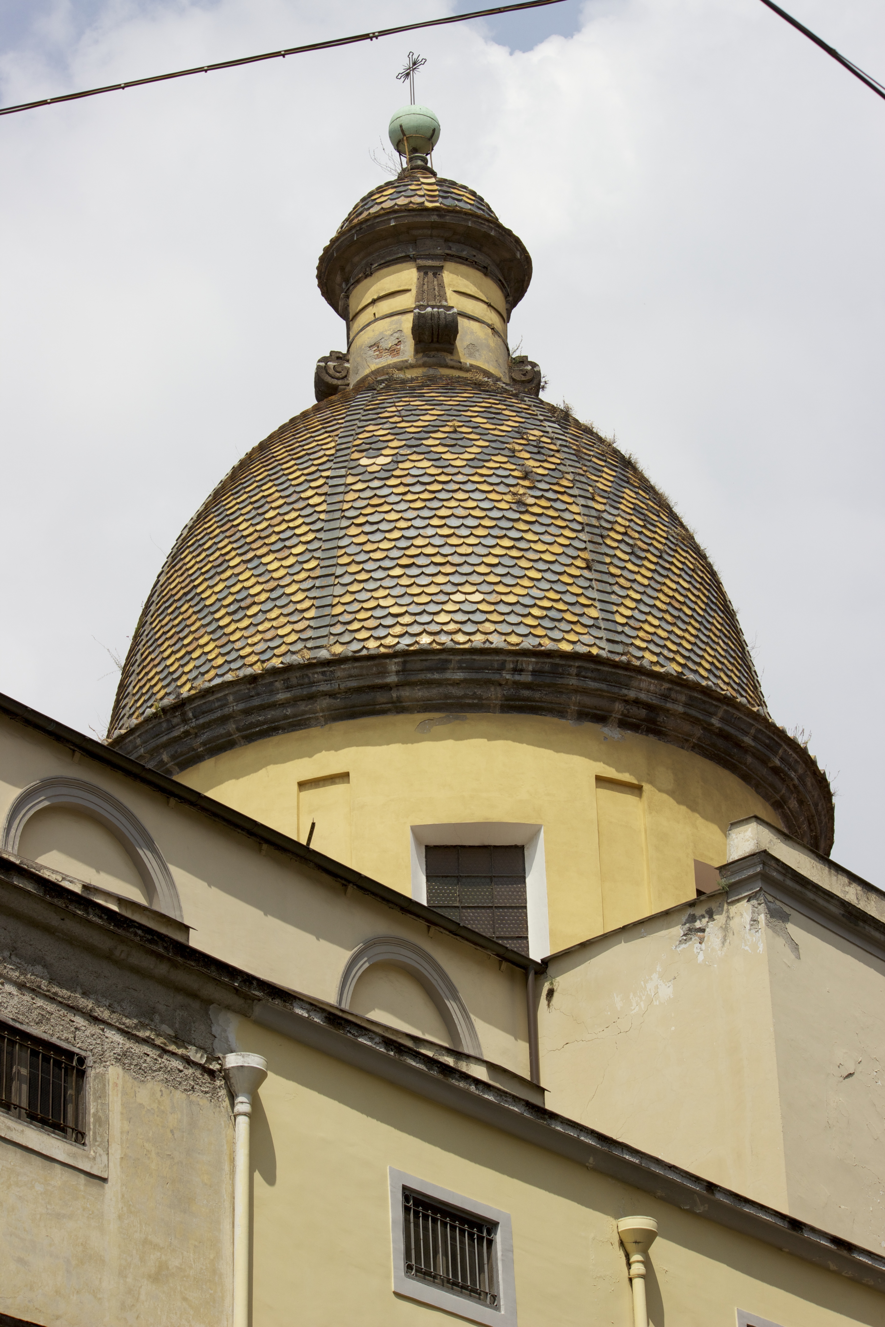 Nápoles. Santa Maria in Portico. Cúpula.